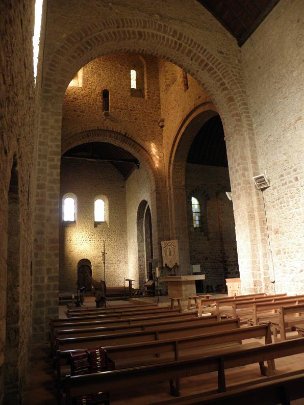 Transept de l'église Notre-Dame d'Ambrières-les-Vallées (53).